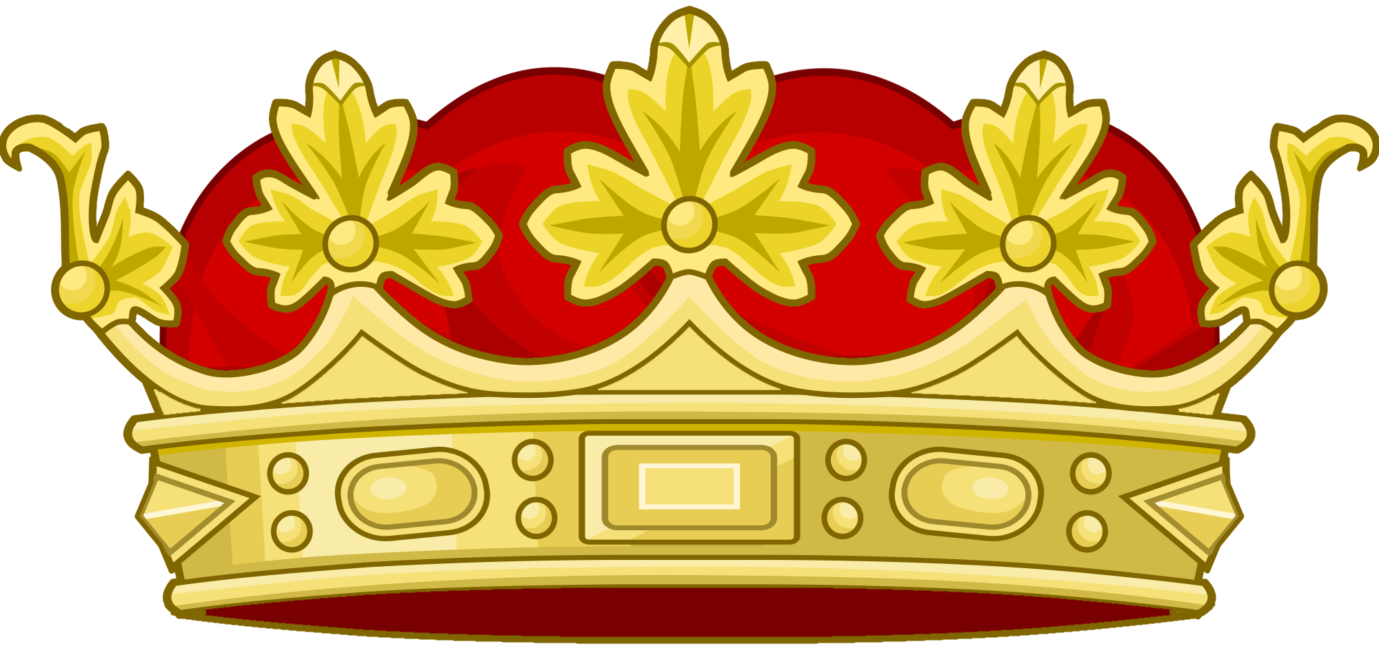 Coronet of a Voivode. Uses elements of Sodacan's 'Coronet of a British Duke' and Tom Lemmens' 'Oldest Electoral Hat'